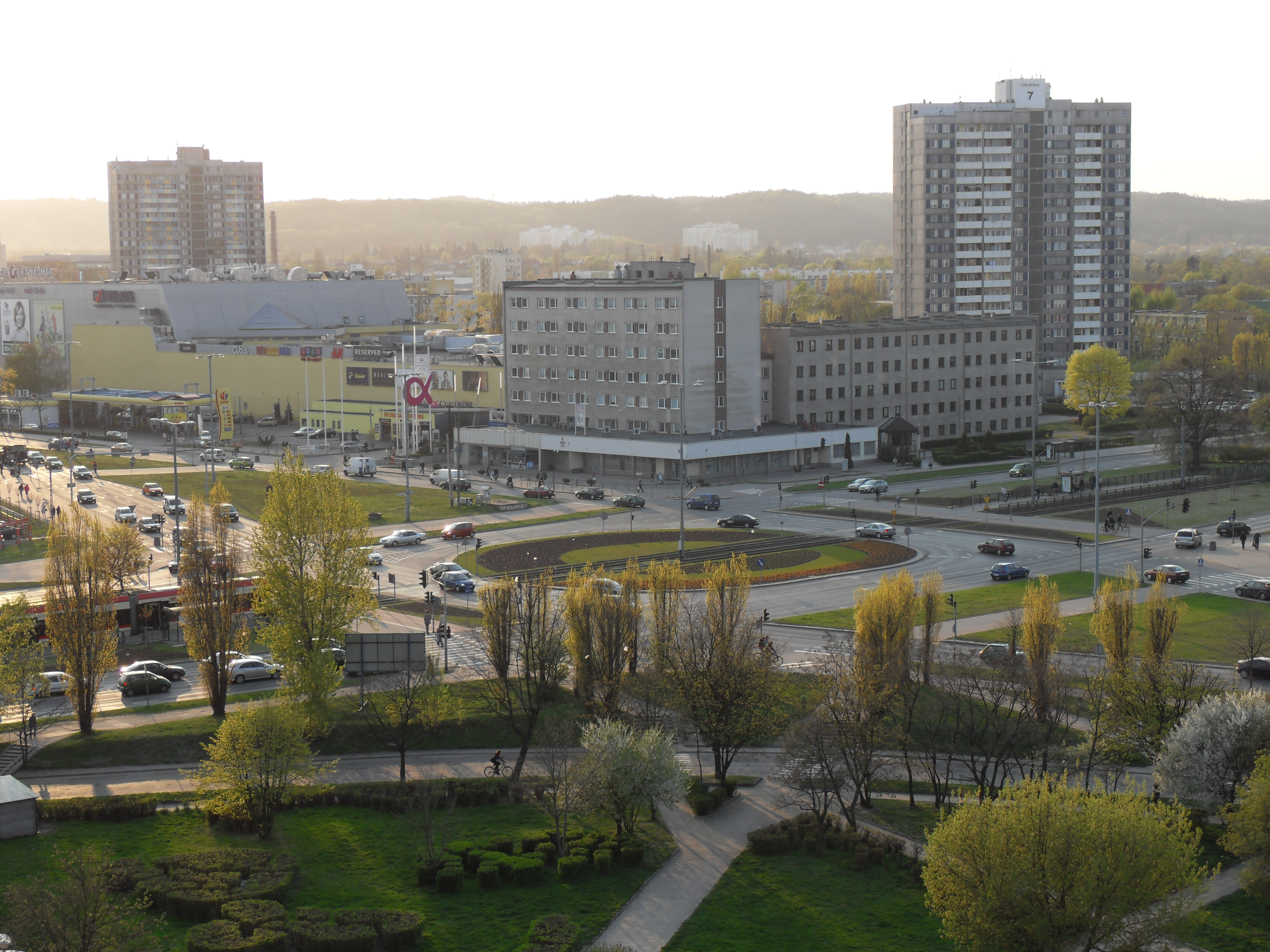 Gdańsk Przymorze, skrzyżowanie ulic Chłopskiej i Kołobrzeskiej.